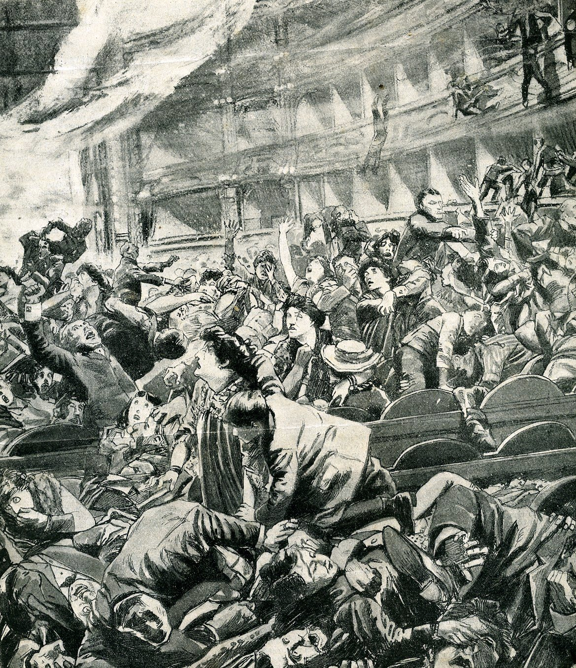 La catastrophe de Chicago Incendie du théatre Iroquoi